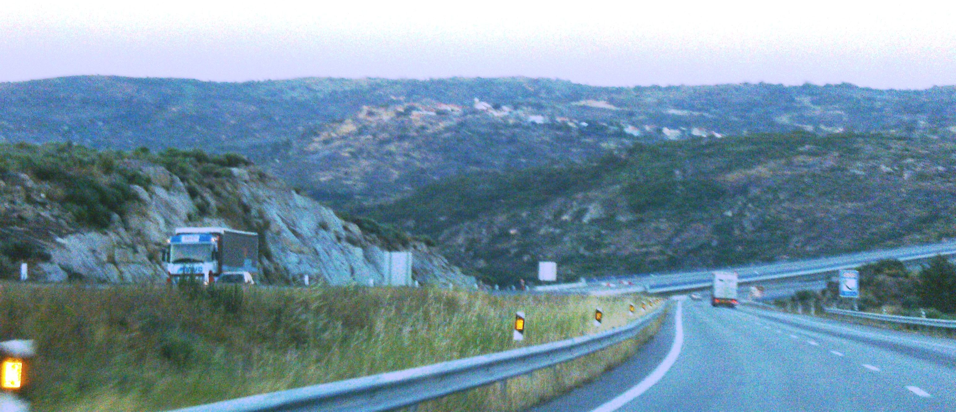 A 25 na sua passagem por Castelo Bom (na colina, ao fundo)